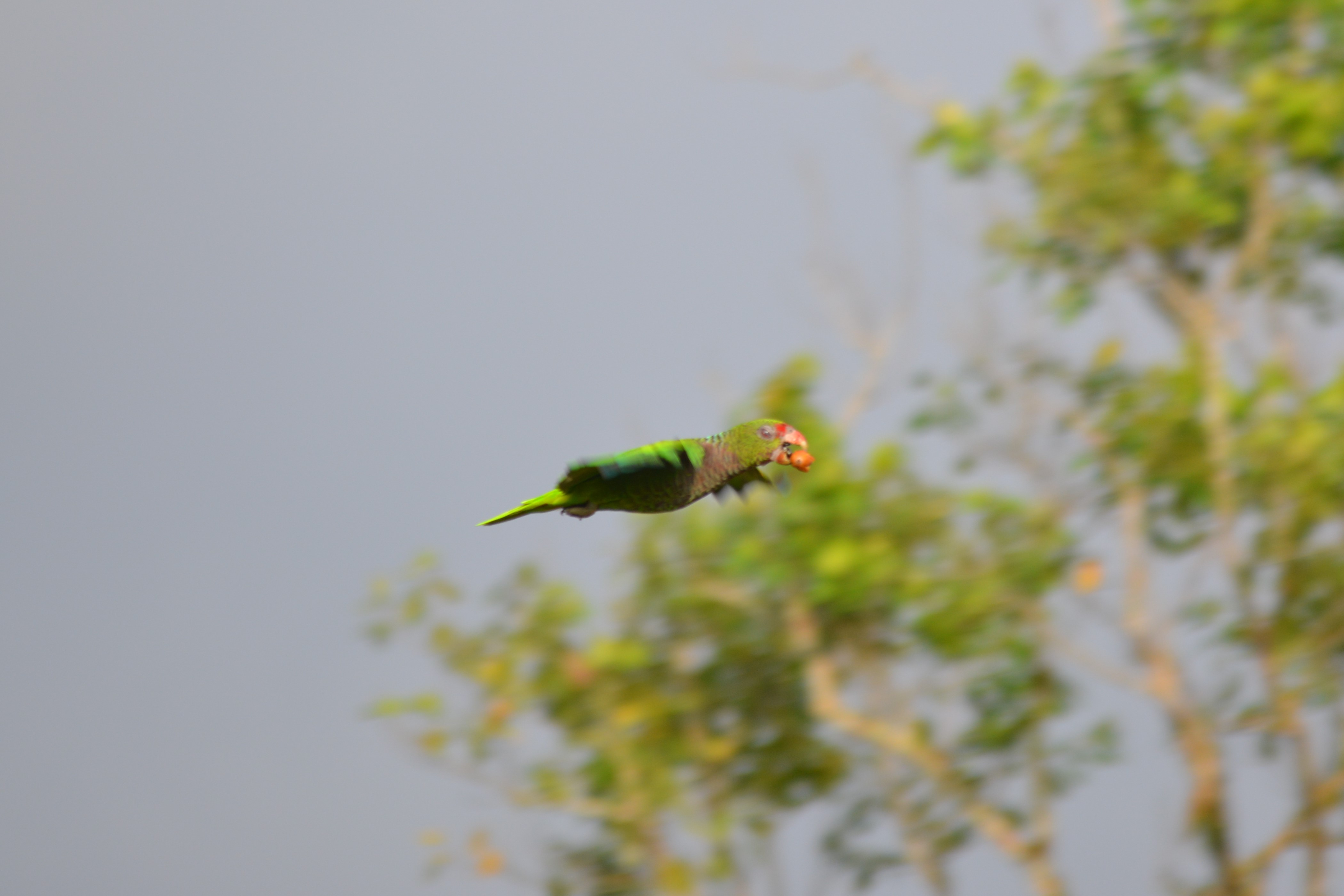 Voando. Foto tirada em Morretes.